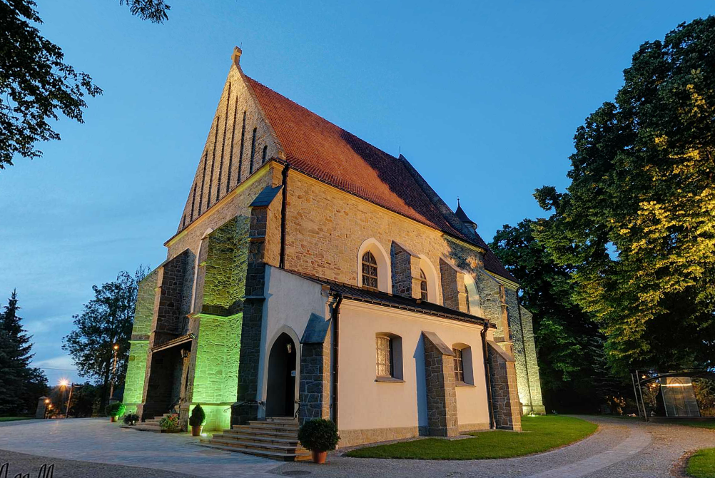 Kościoł farny w Jaśle